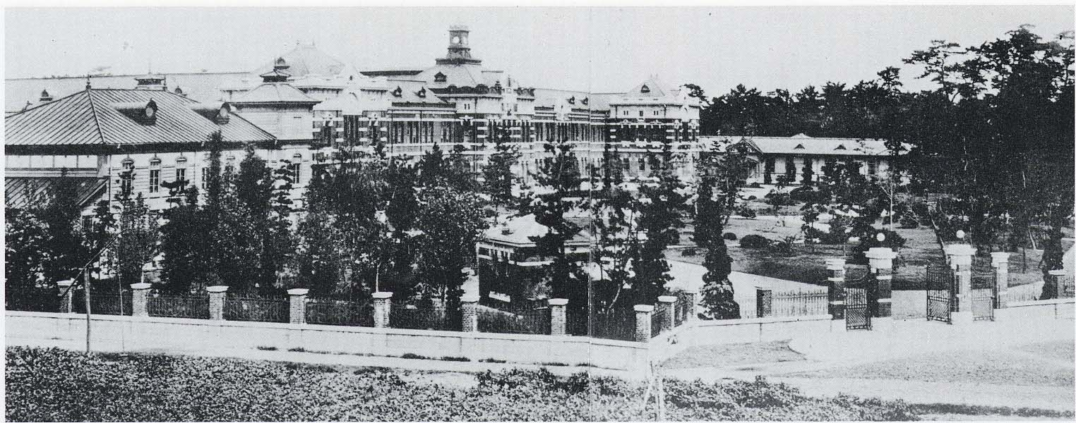 九州帝国大学工学部正門と本館